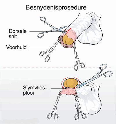 Besnydenisprosedure